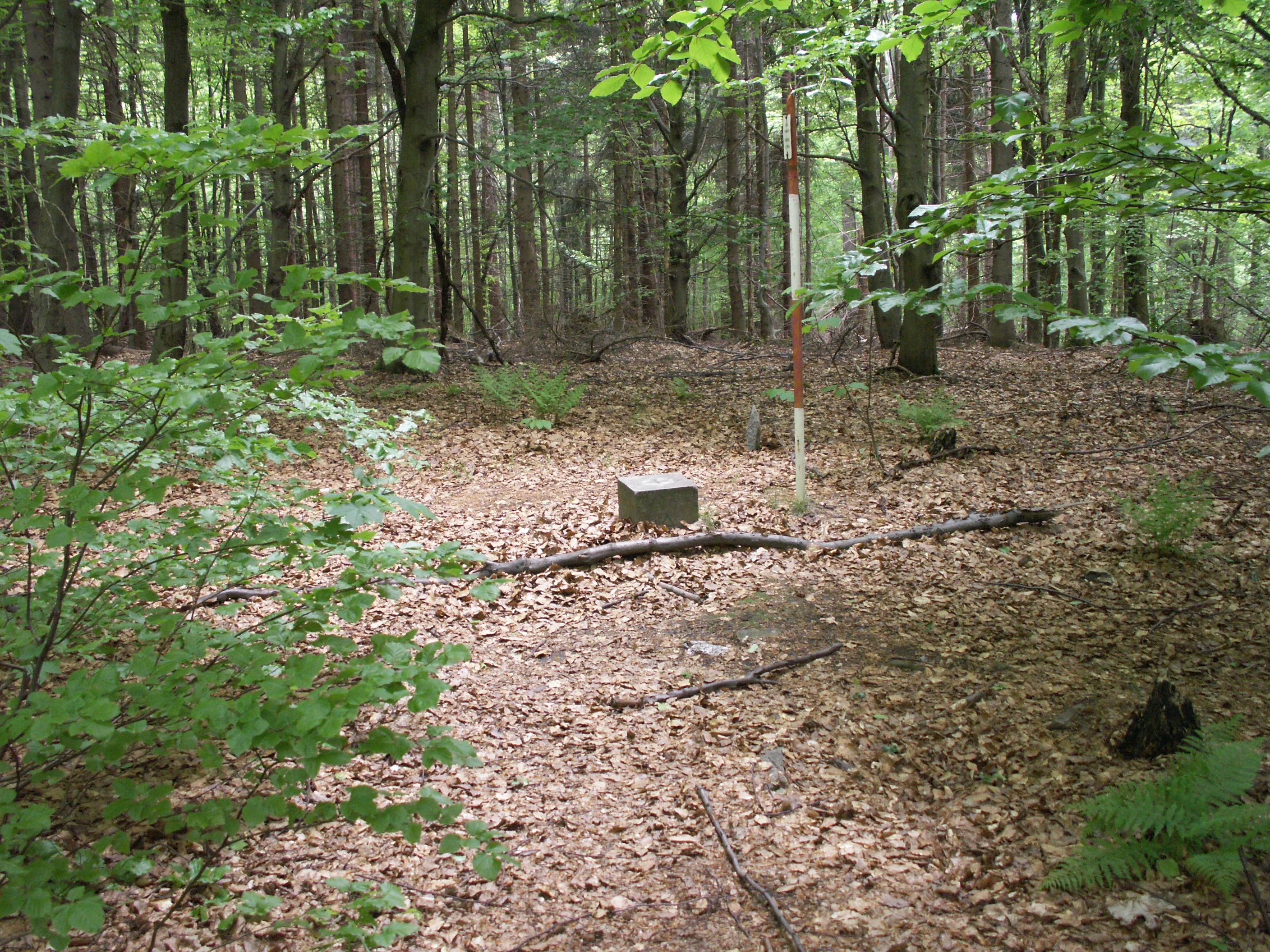 Národní přírodní rezervace Žákova hora, geodetický bod na vrcholu, kóta 809,8 m n.m., okres Žďár nad Sázavou, kraj Vysočina